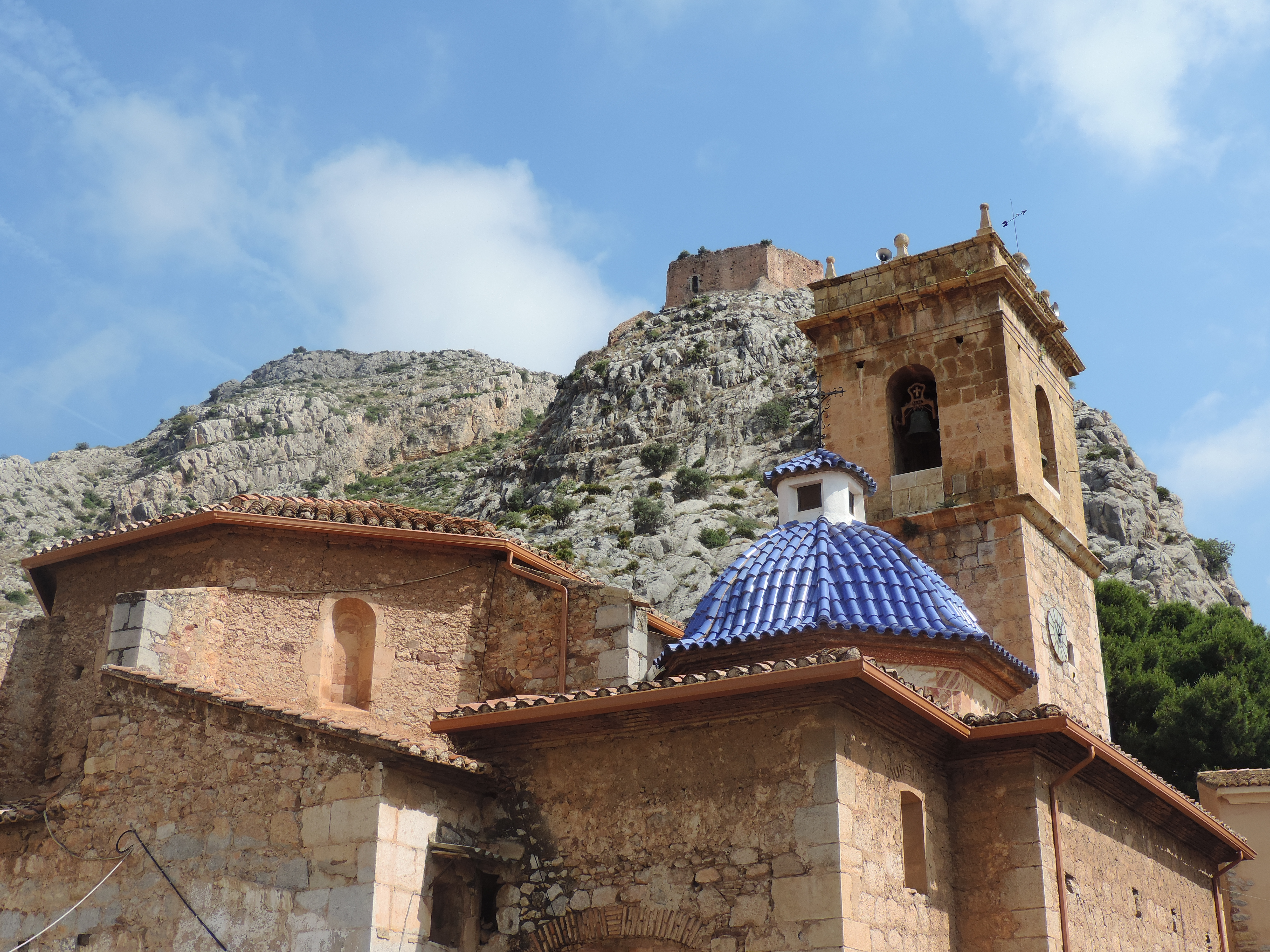 Iglesia de San Bartolomé y castillo al fondo